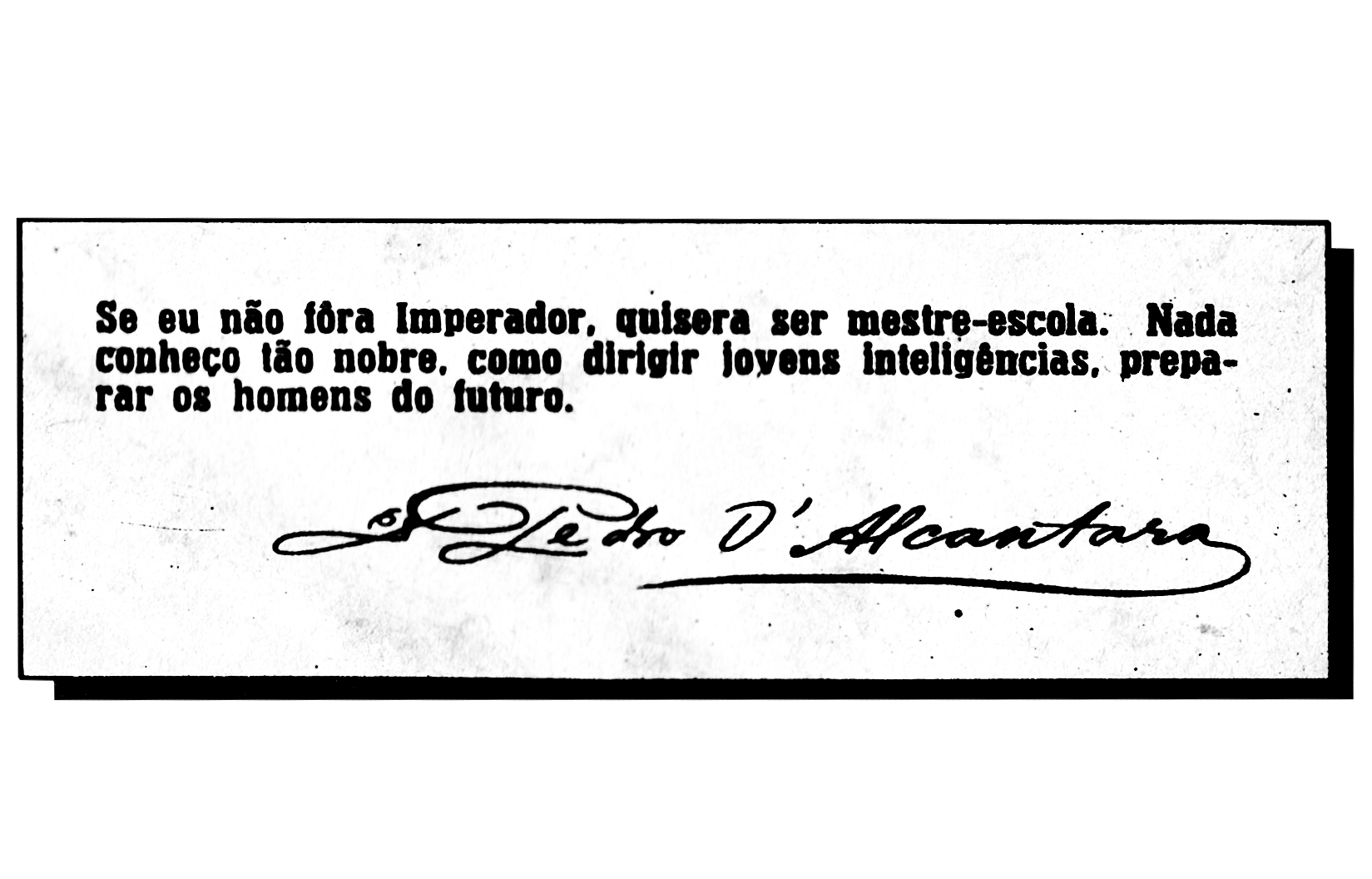 Plaquinha com frase de Dom Pedro II do Brasil sobre ser mestre-escola [professor].